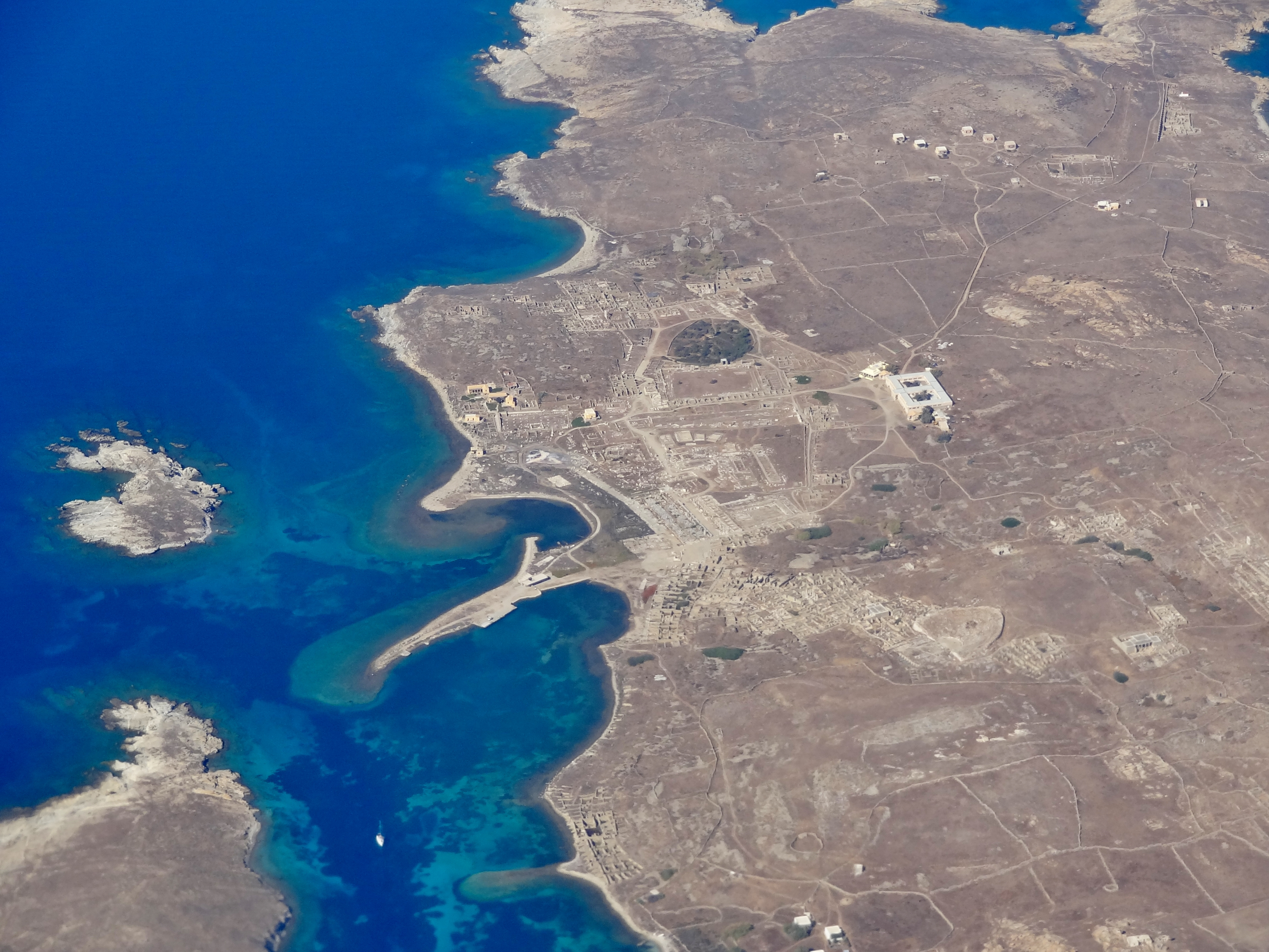 Luftbild von Delos, Kykladen, Griechenland